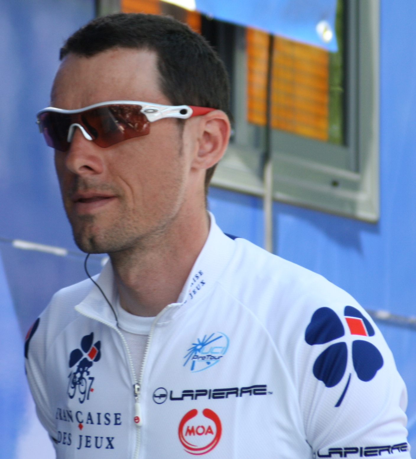 Sébastien Joly aux Quatre jours de Dunkerque 2008